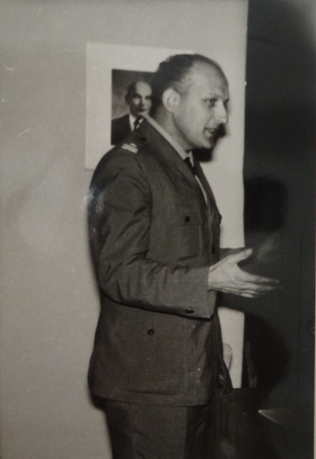 Garnizon Stargard Szczeciński, 1967r. Dowódca 45 bm mjr Jan Białożyński